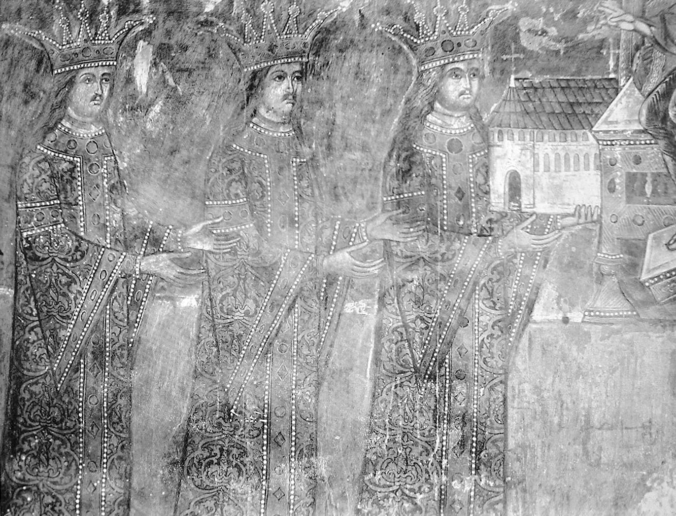 Ştefan cel Mare, Bogdan cel Orb and Petru Rareş. Fresco in Dobrovăţ monastery.